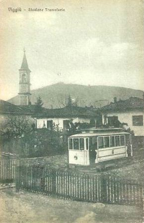 Viggiù, stazione tram.JPG